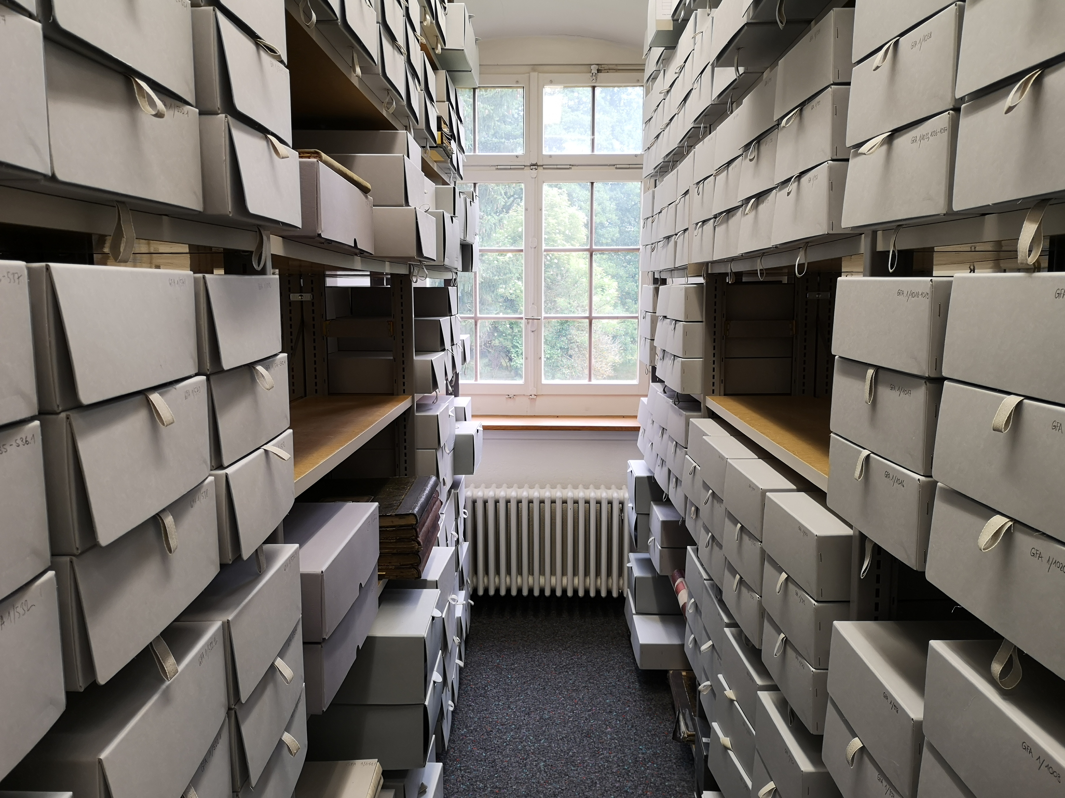 Eisenbibliothek